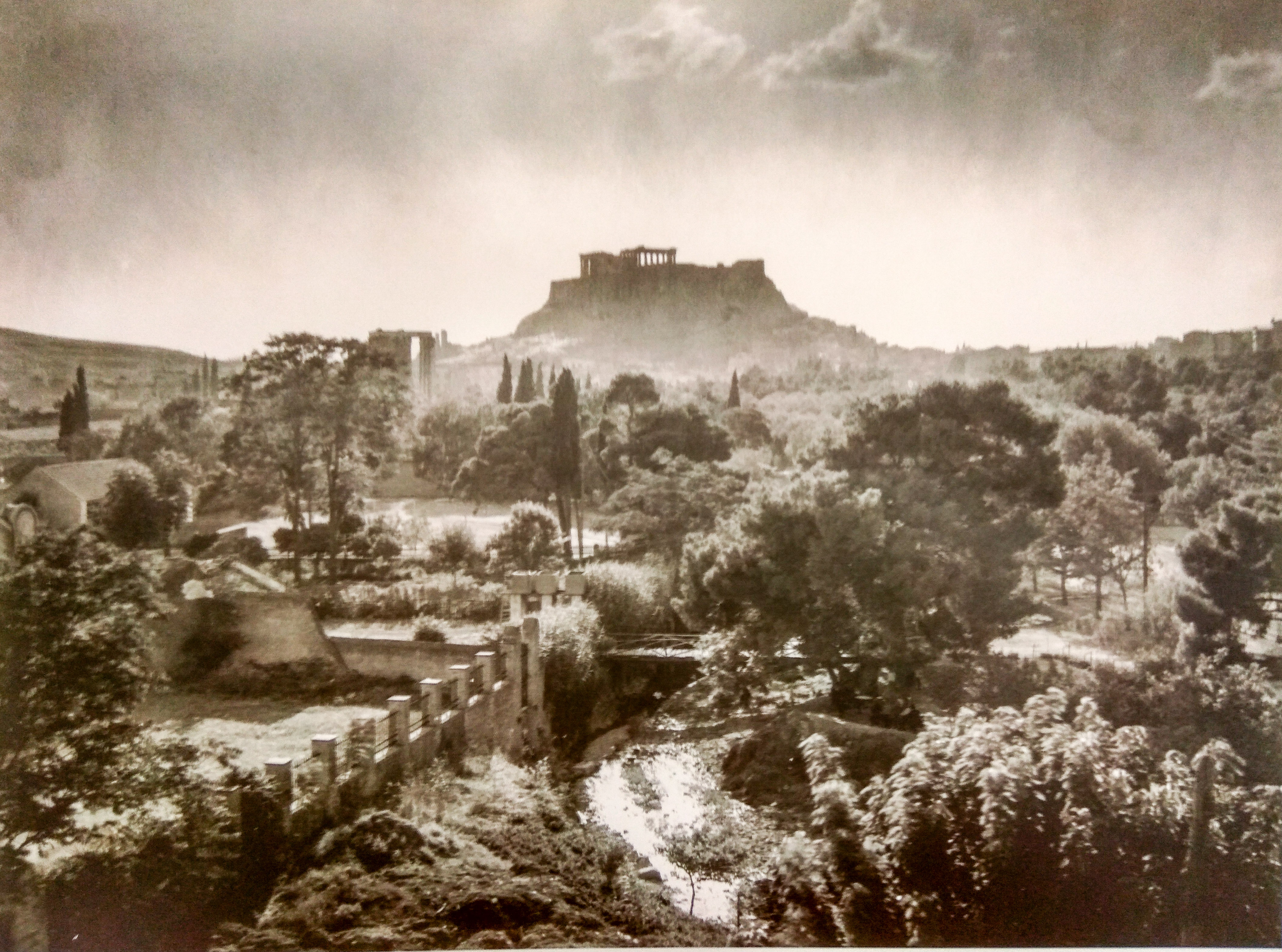 Κατάφυτη παριλίσια περιοχή με Ολυμπιείο και Ακρόπολη.